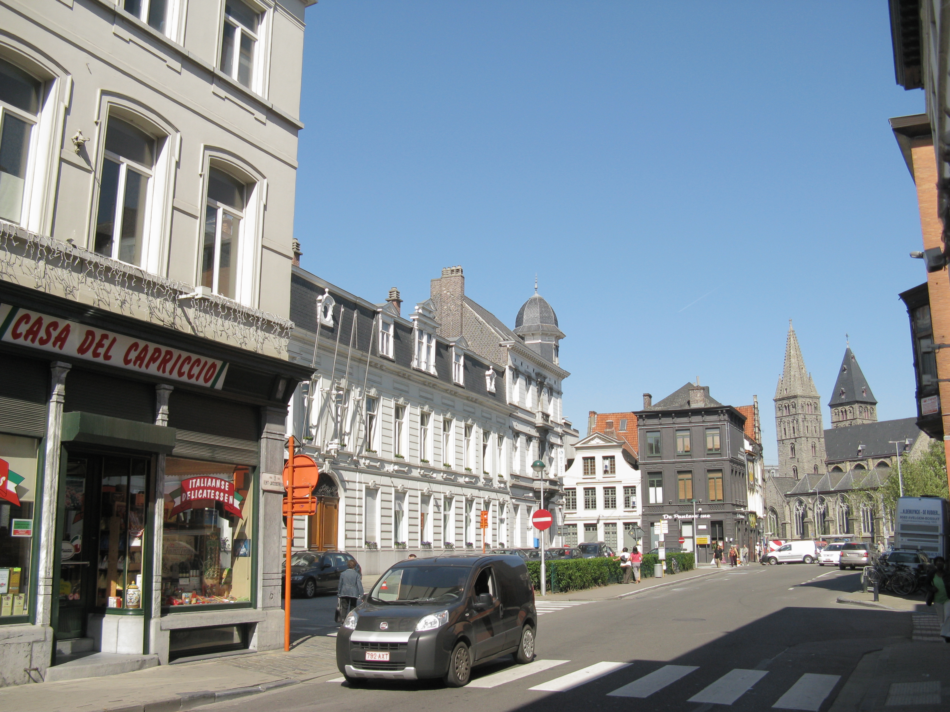 Gent, hoek Sint-Jacobsnieuwstraat en Vlasmarkt